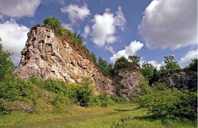 fotografie z přírodní památky Lom na Kobyle